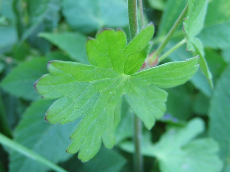 Blatt eines Pyrenäen-Storchschnabels Geranium pyrenaicum